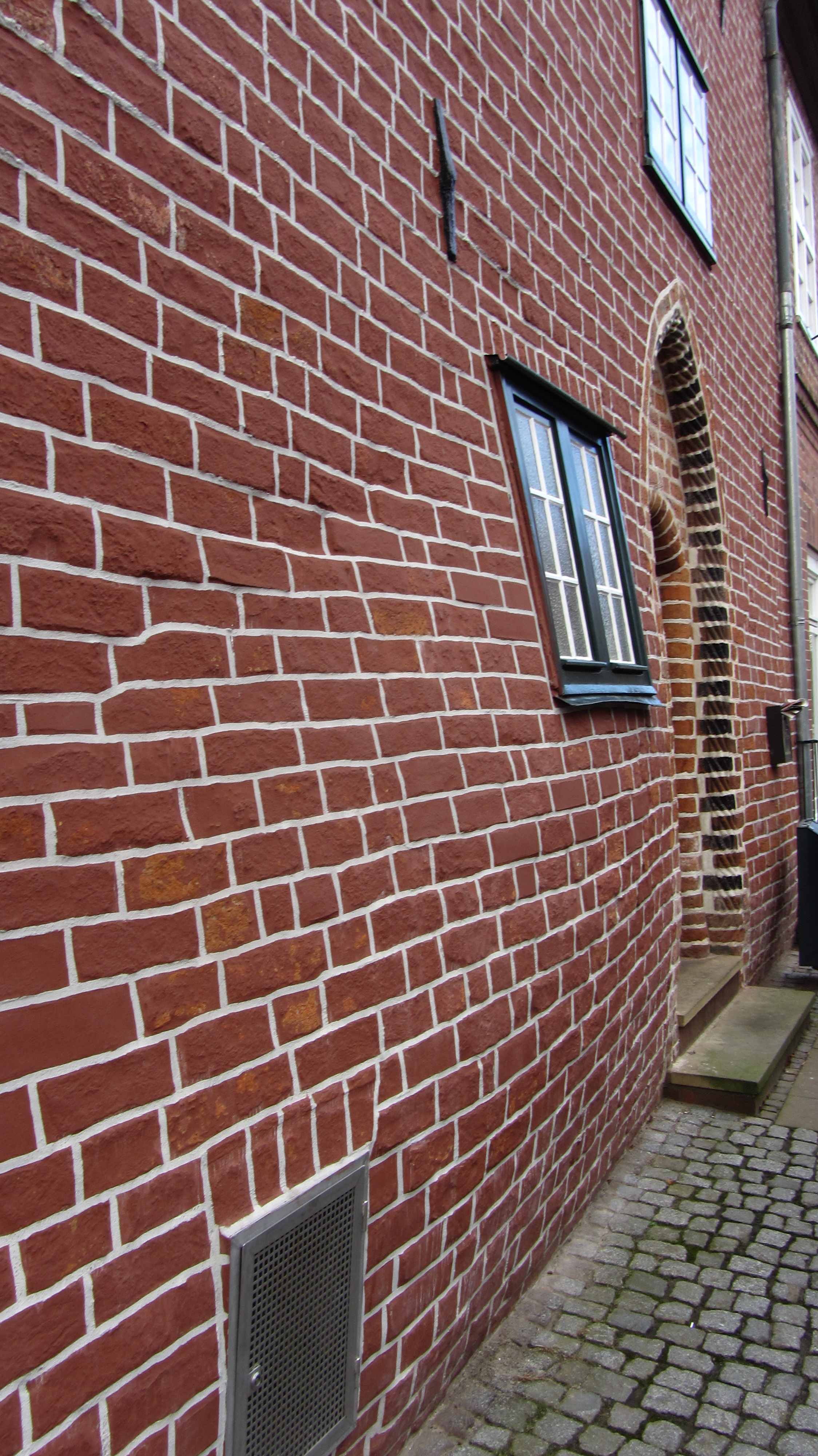 Mauer in Lüneburg mit Hochbrandgips als Mörtel